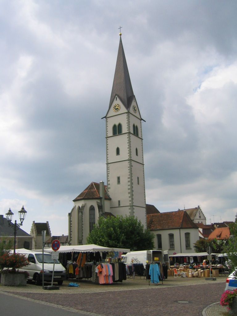 Kath. Pfarrkirche St. Nikolaus in Markdorf